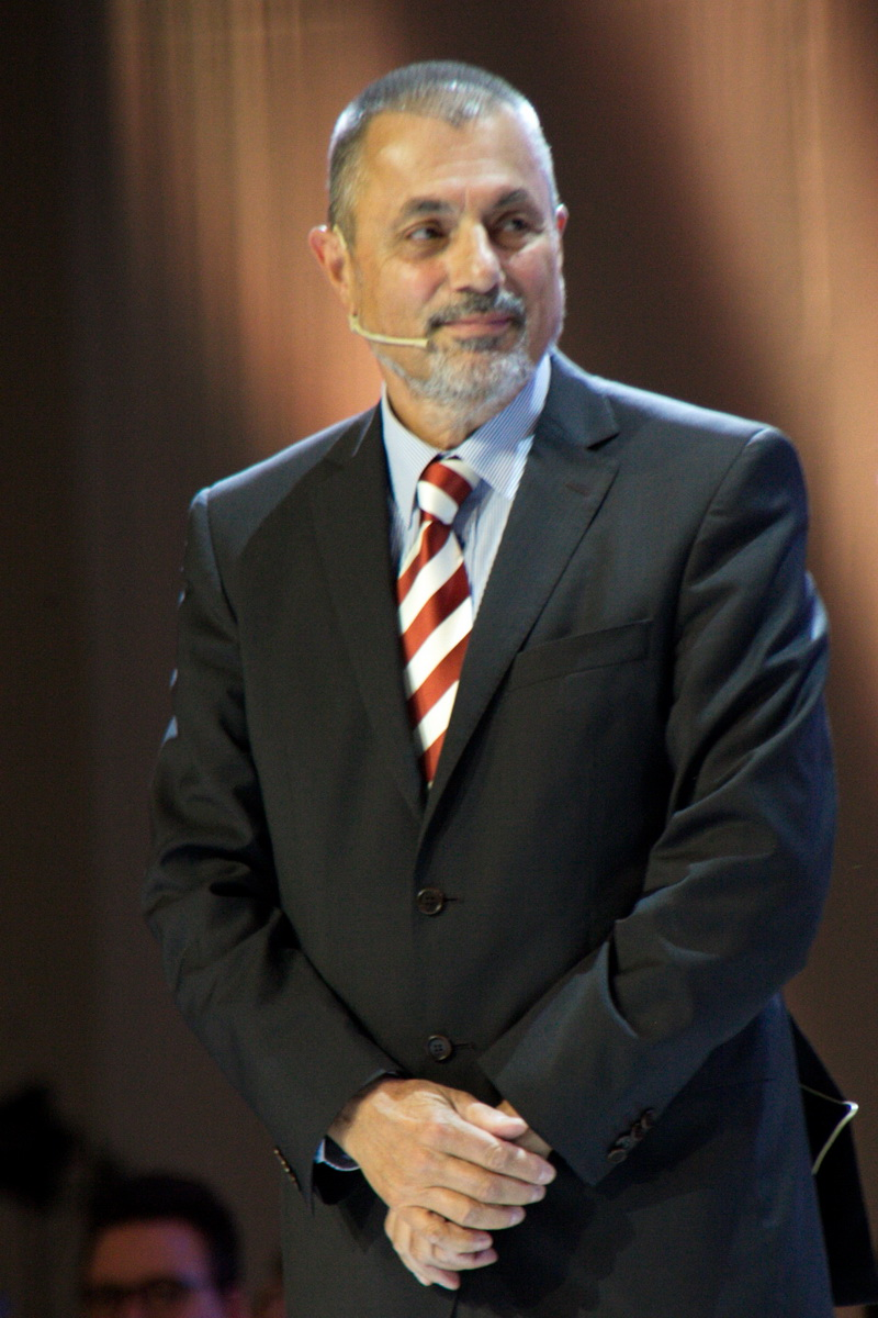 Peter Jambrek (1940), en un acte d'Esquerra Republicana de Catalunya a favor del referèndum d'autodeterminació de Catalunya. Barcelona, 4-3-2017